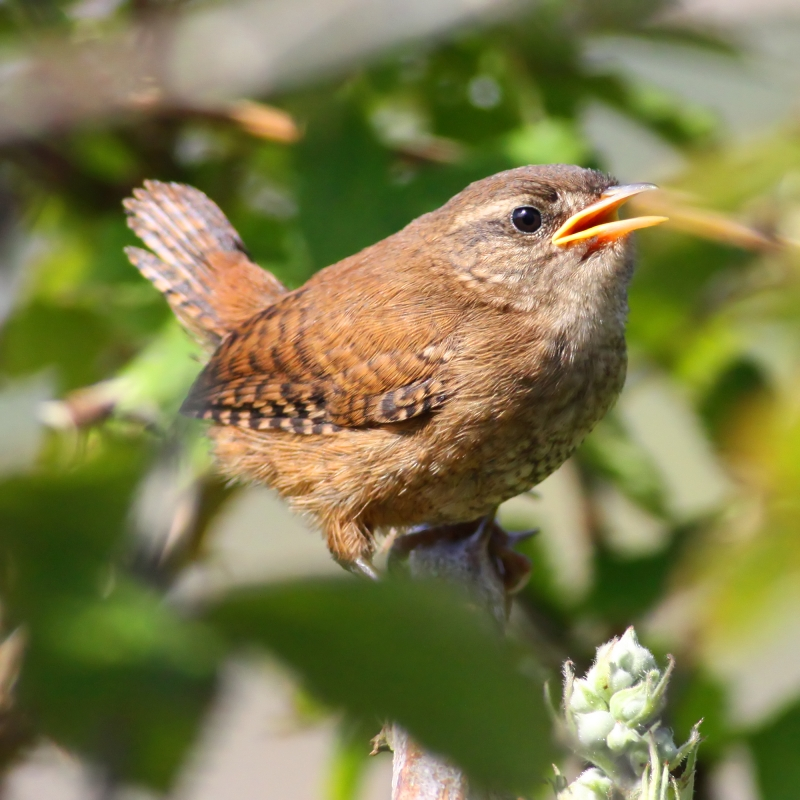 Wren (Troglodytes troglodytes)